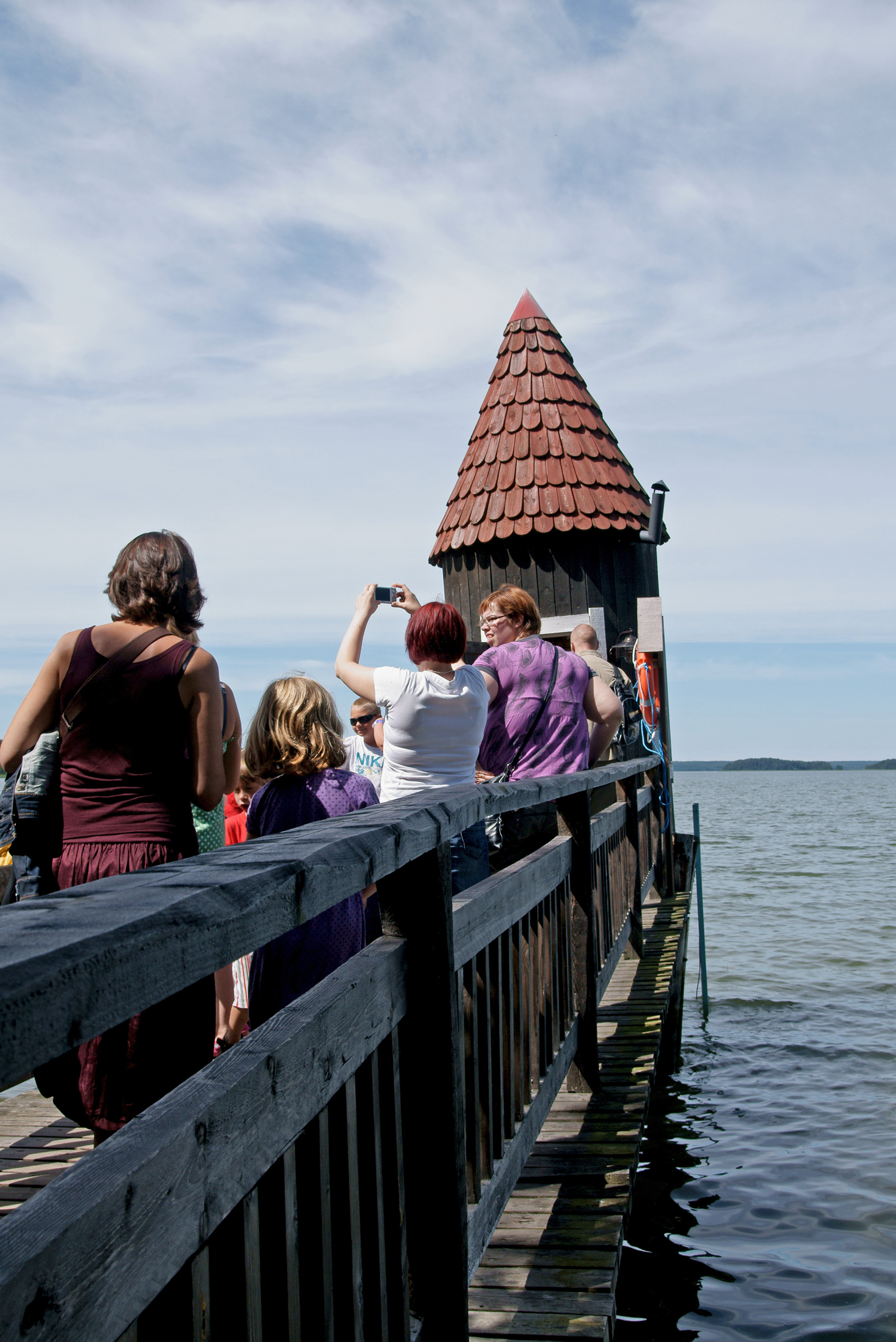 Muumien uimahuone Muumimaailmassa, Naantalissa.